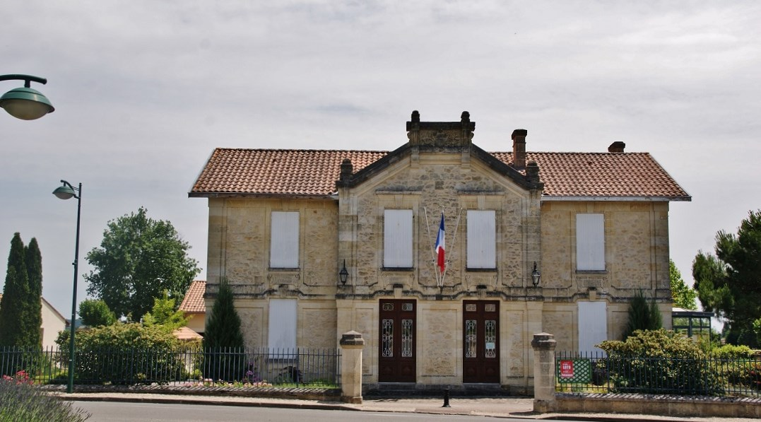 La Mairie